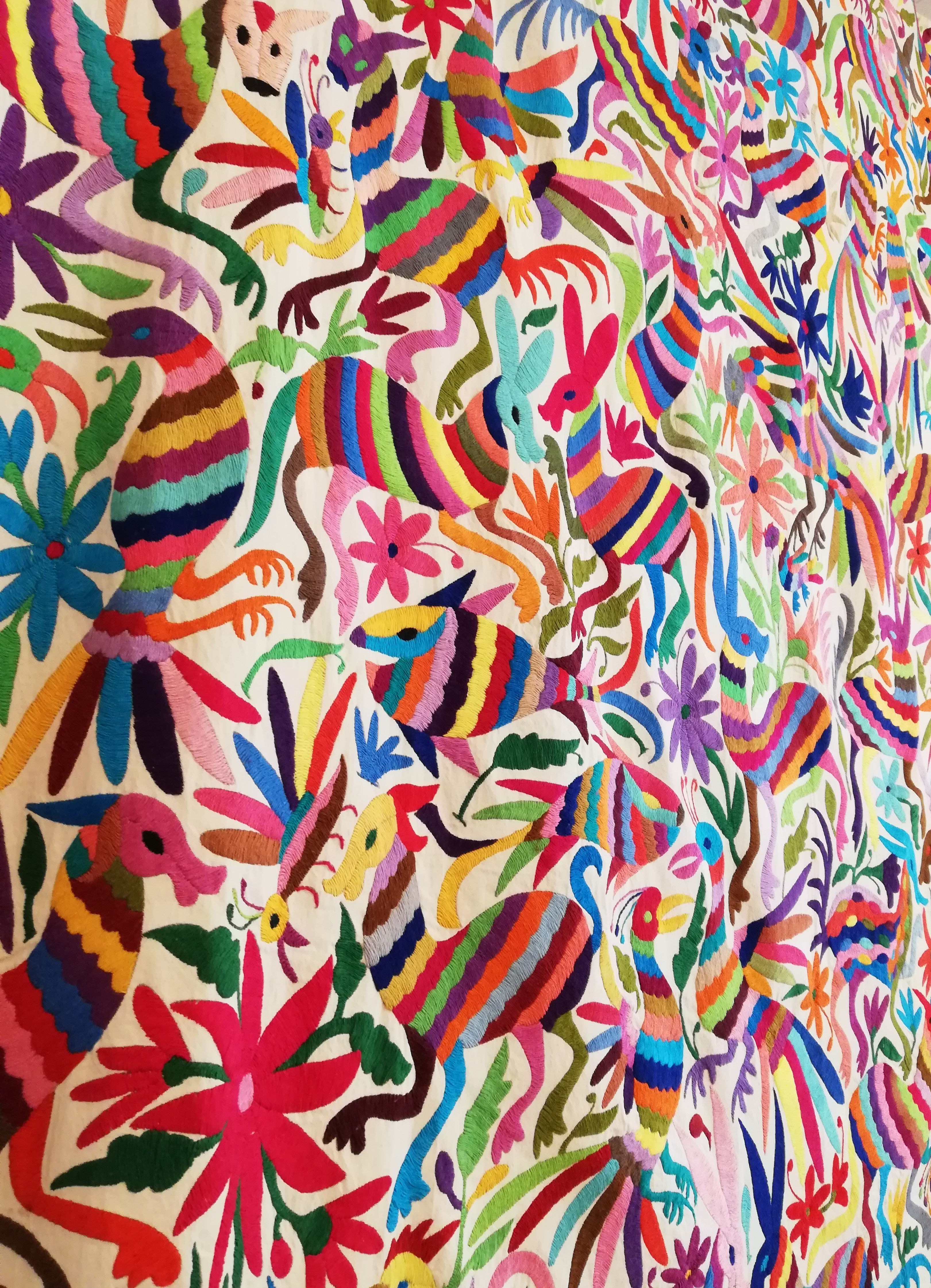 “Tenango de colores con motivos de fauna” (s/f). Cándida Pérez. Bordado sobre manta. Sección de textiles del Museo de Arte Indígena Contemporáneo, Cuernavaca Centro, Avenida Morelos 275, Morelos, México.